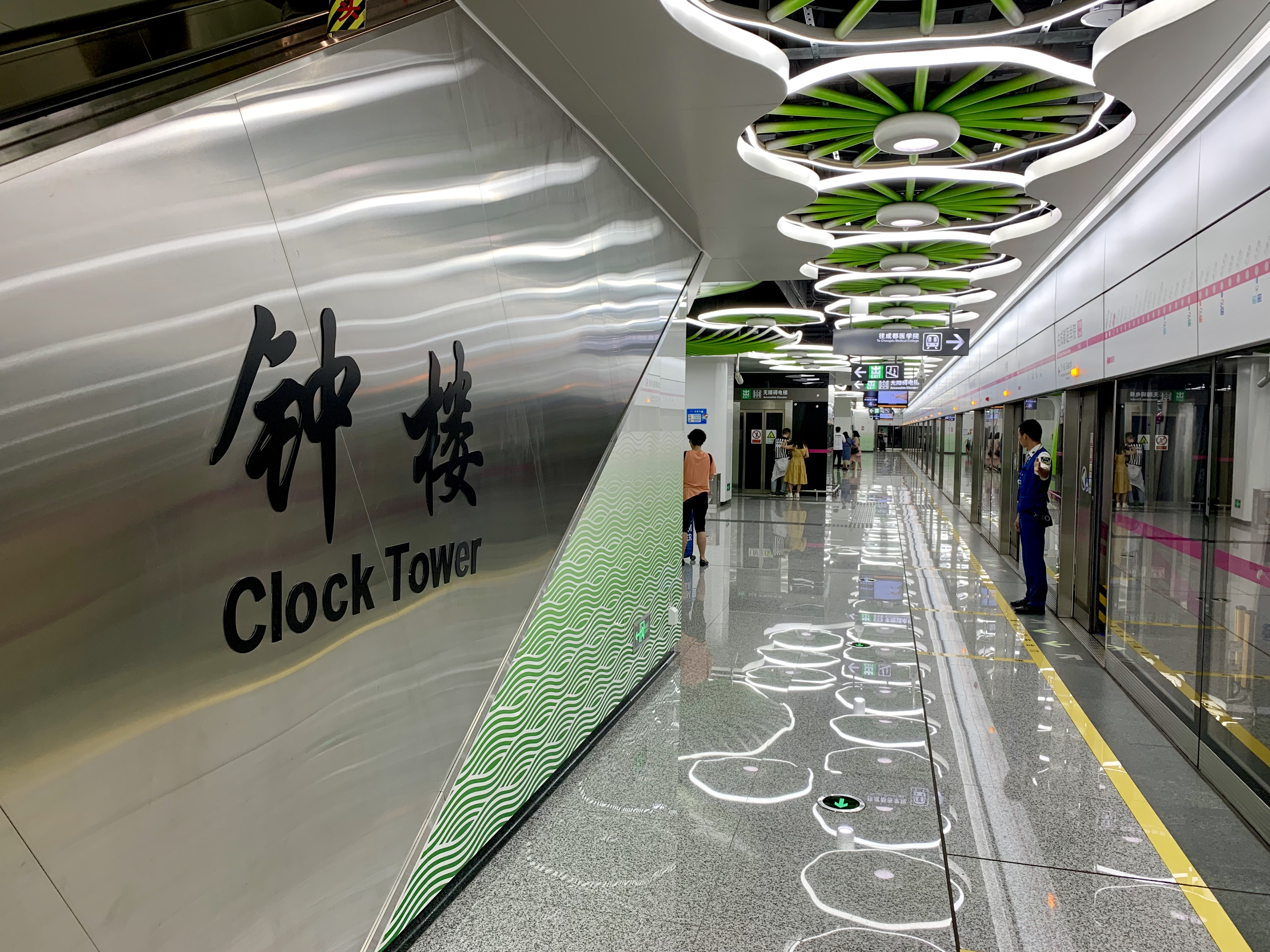 成都地铁钟楼站